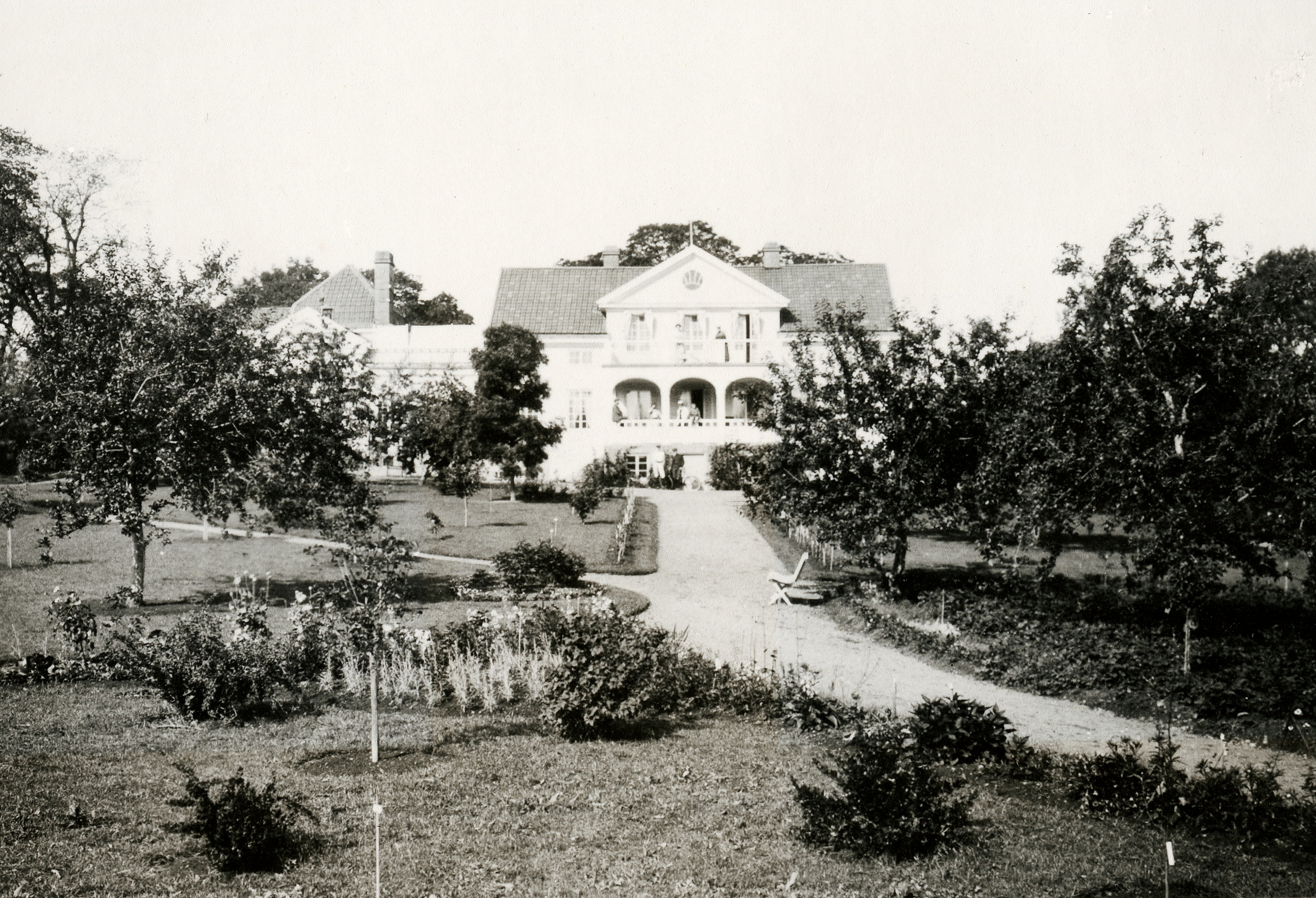 Herrgården, Bränninge 1910. Bilden ingår i två stora fotoalbum efter direktör Karl Wilhelm Hagelin som arbetade länge vid Nobels oljeanläggningar i Baku.